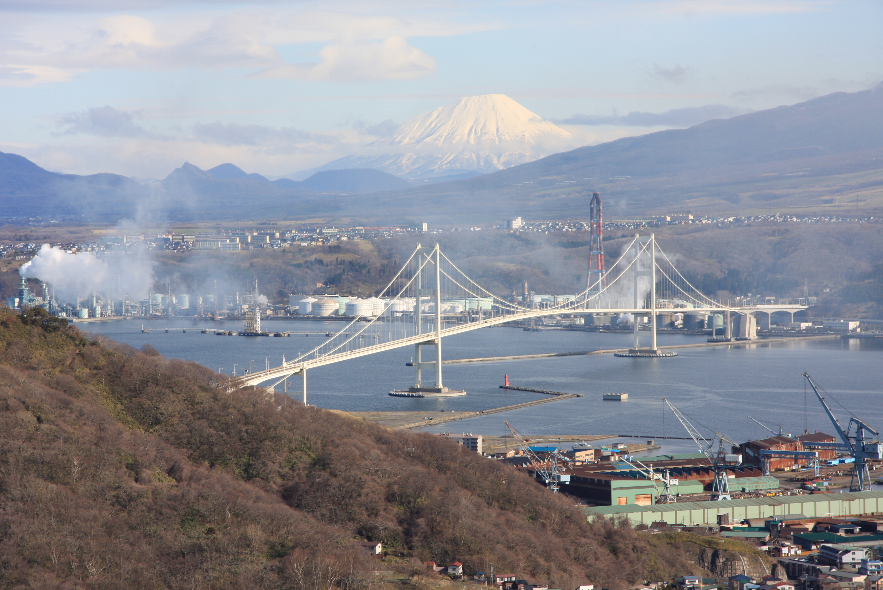 室蘭市・測量山から望見する白鳥大橋と羊蹄山